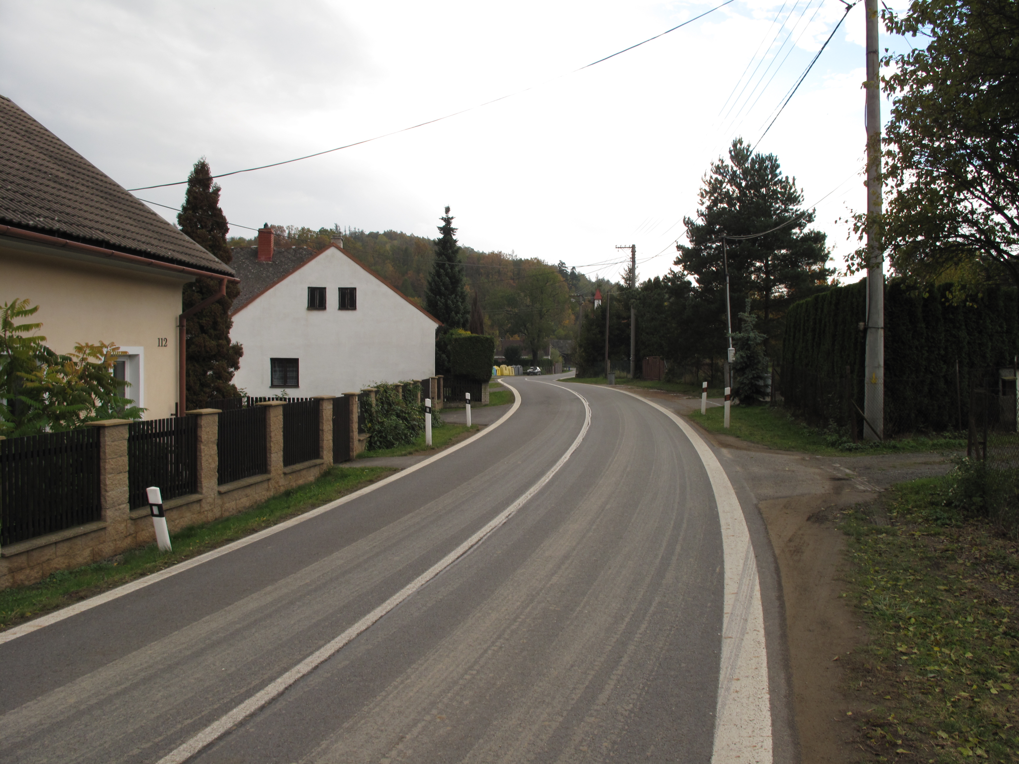 Láryšov. Okres Bruntál, Česká republika.